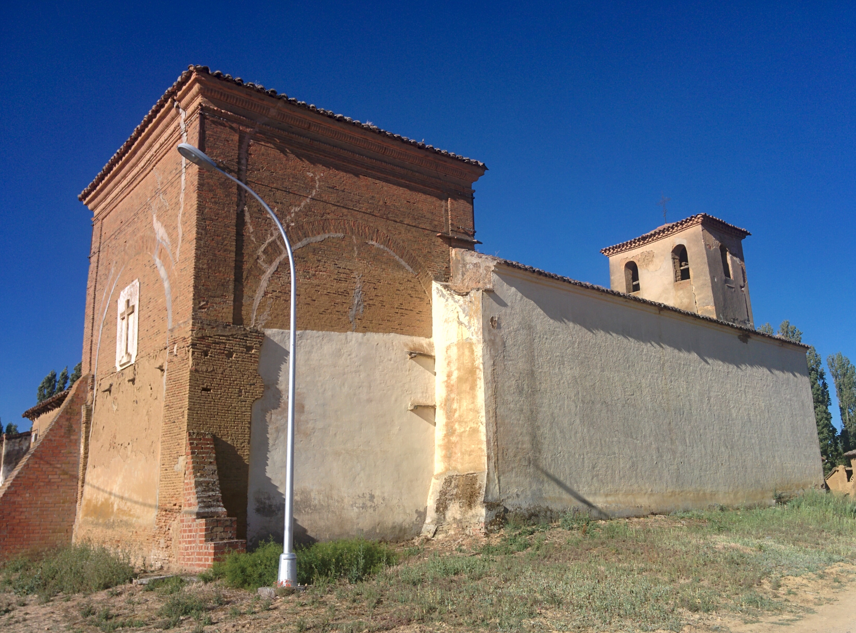 Iglesia de Nuestra Señora de las Heras, en Villelga (Palencia, España).